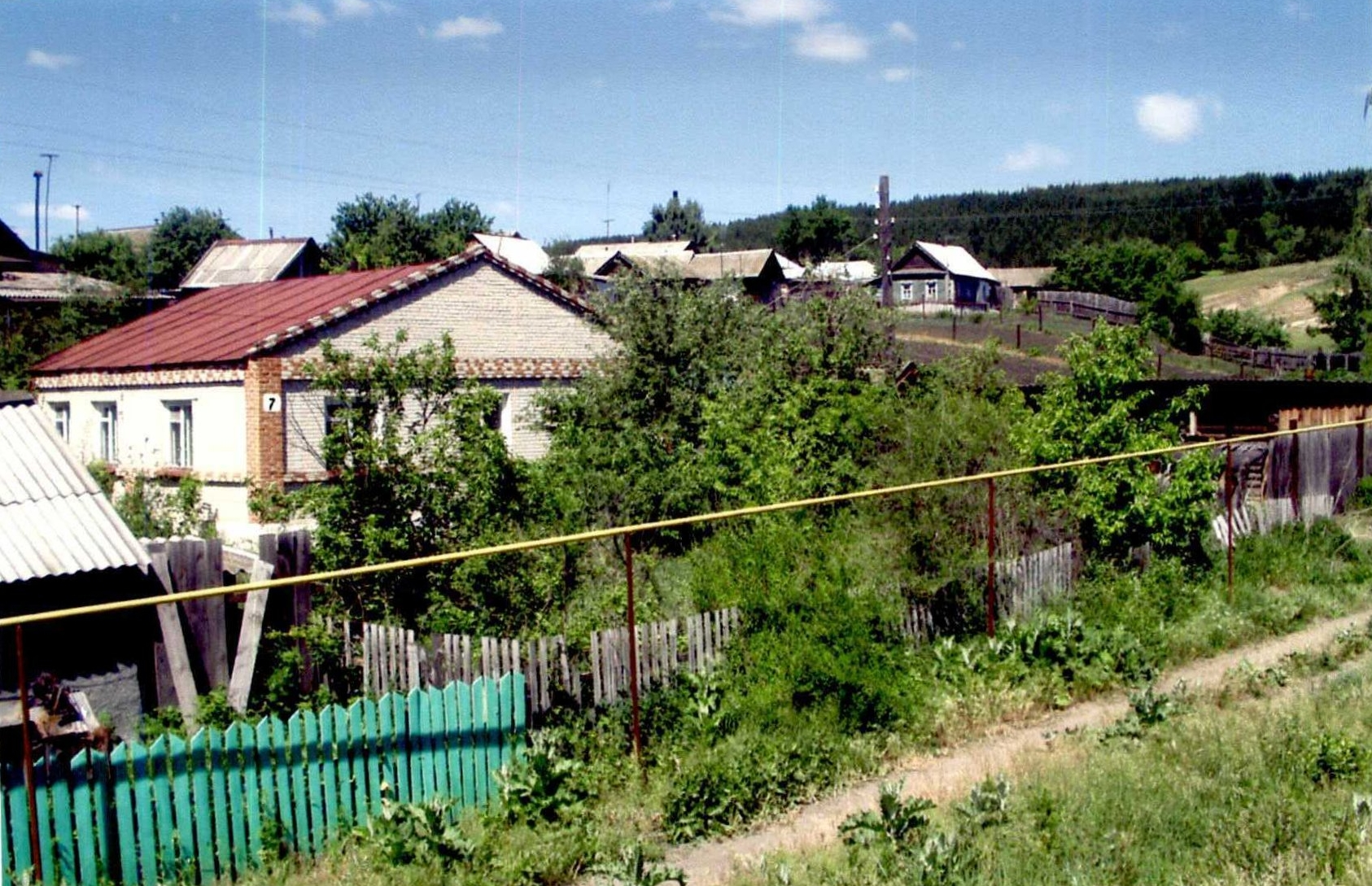 Переулок в Николаевке.